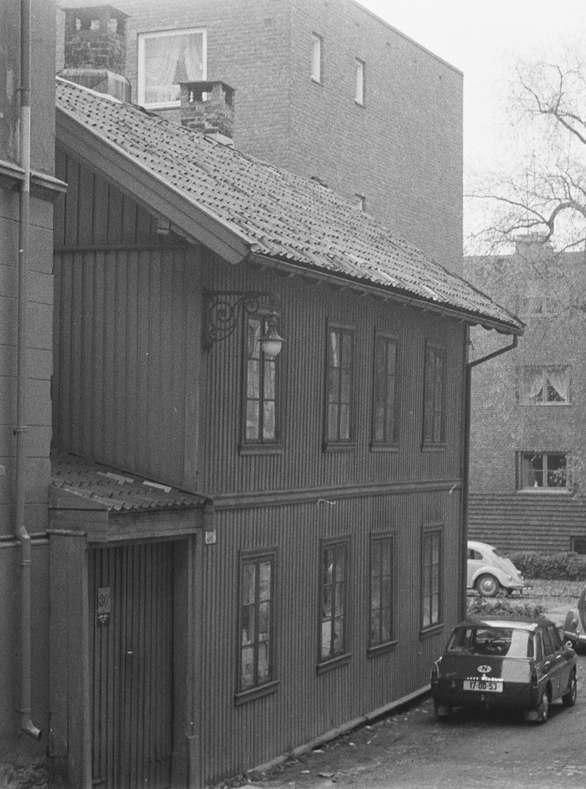 Lallakroken i 1966. Trehuset til venstre hadde tidligere adresse Briskebyveien 30B, nå Lallakroken 5.